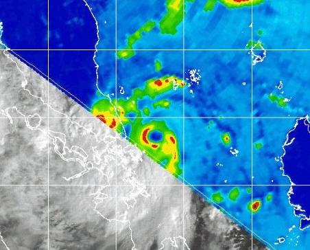 Typhoon Vamei at 27 December 2001 0003Z